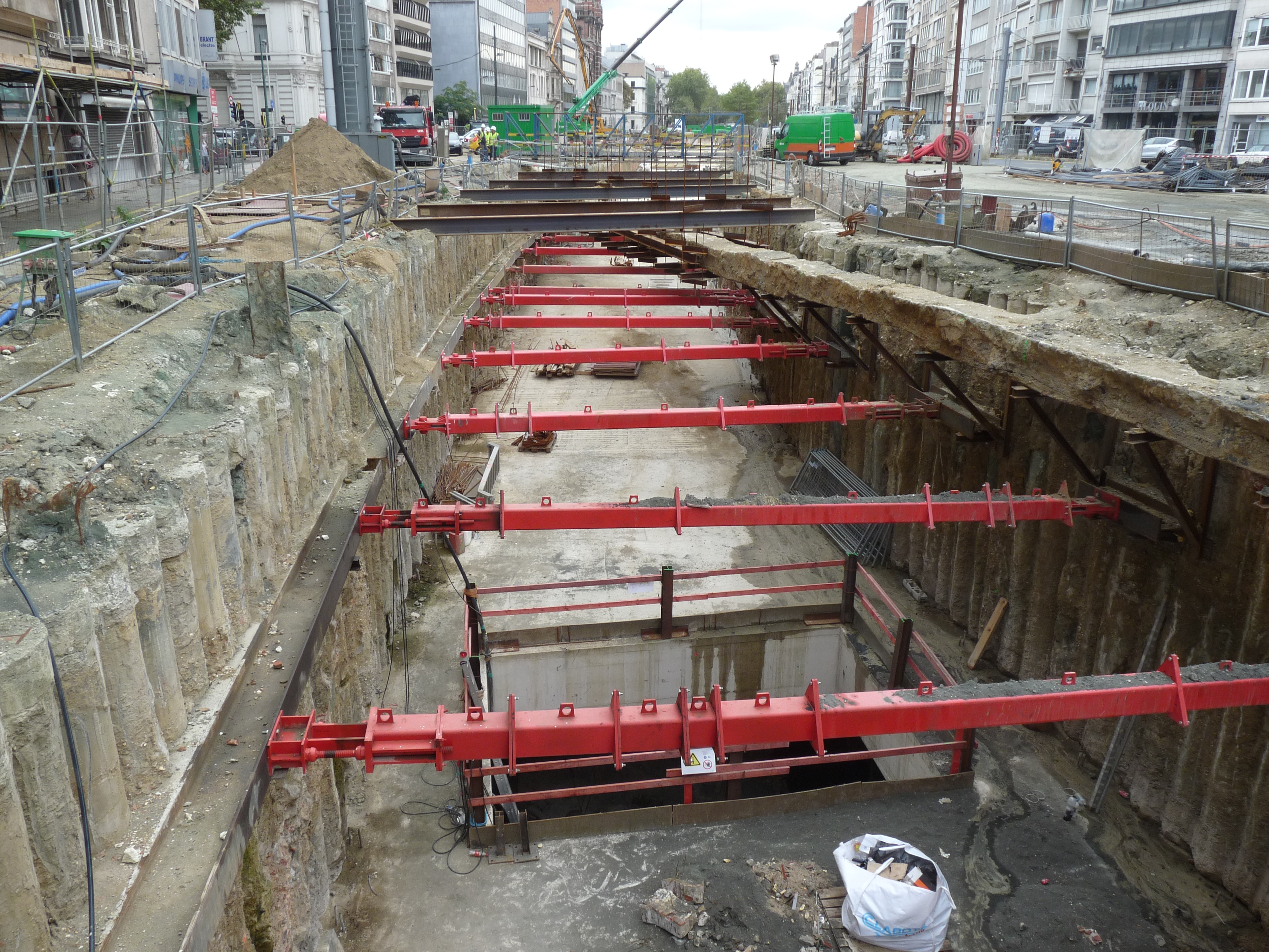 De werkzaamheden voor de toekomstige tramhelling in Frankrijklei. Gezien richting Zuiden